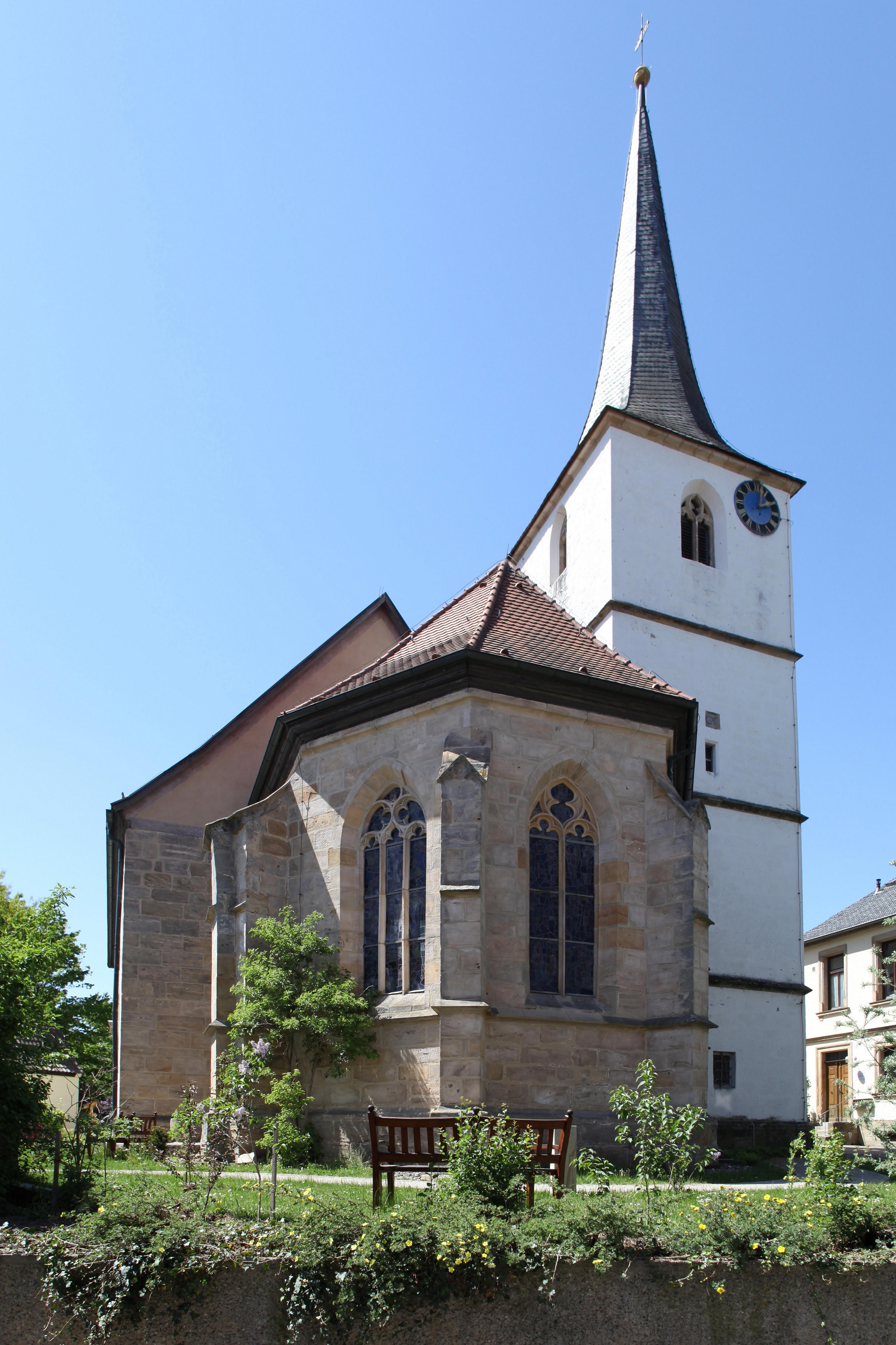 Ev. Johanneskirche, Gemünda, Landkreis Coburg